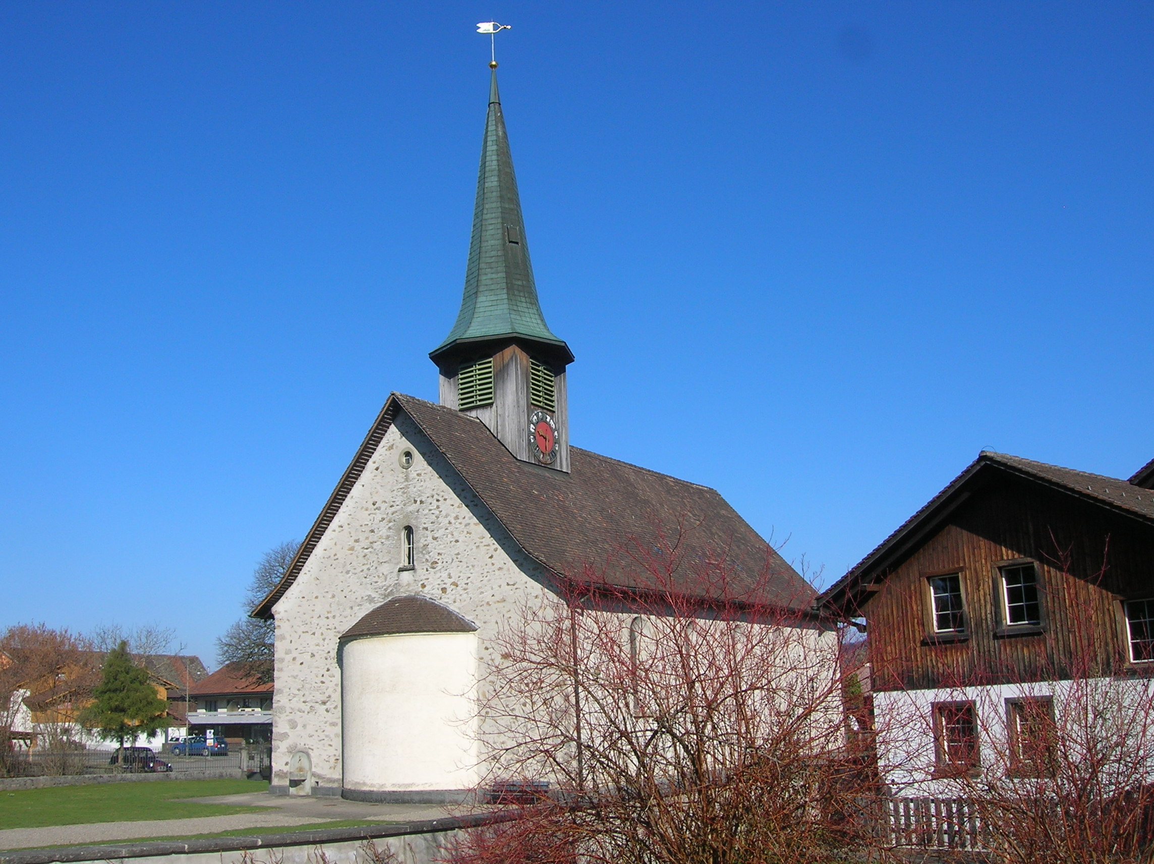 Hittni, Reformierti Chile vo 1708